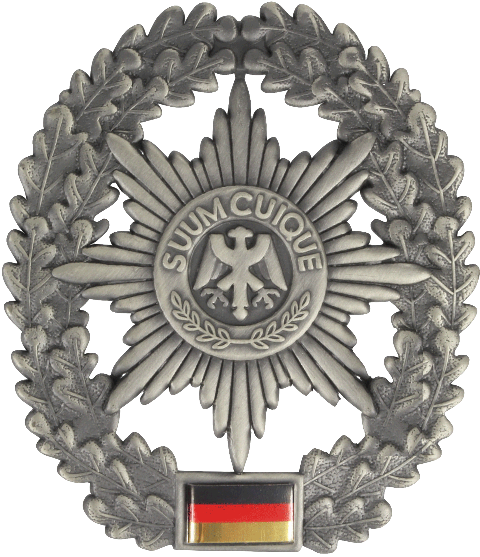 Barettabzeichen der Feldjägertruppe der Bundeswehr Barettfarbe: Korallenrot Maße: Hoch: 53mm Breit: 46mm Ausführung: altsilber, Metall